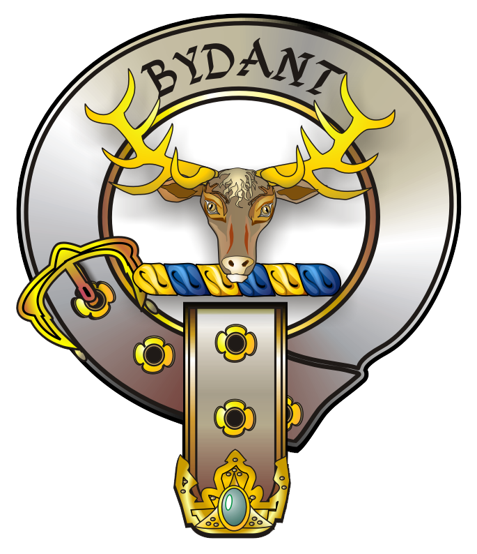 Clan Gordon Crest